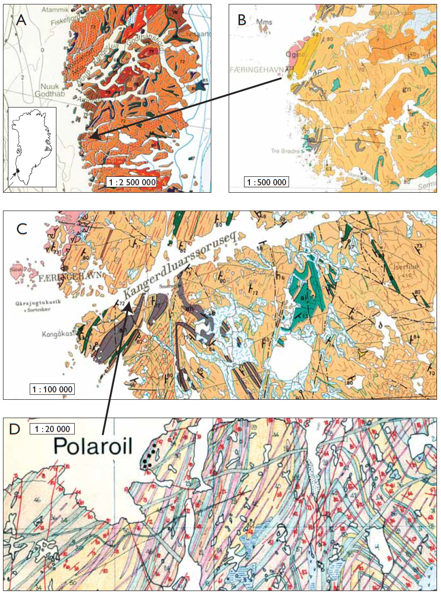 Fire forskellige geologiske kort i fire forskellige målestokke over samme område i Vestgrønland